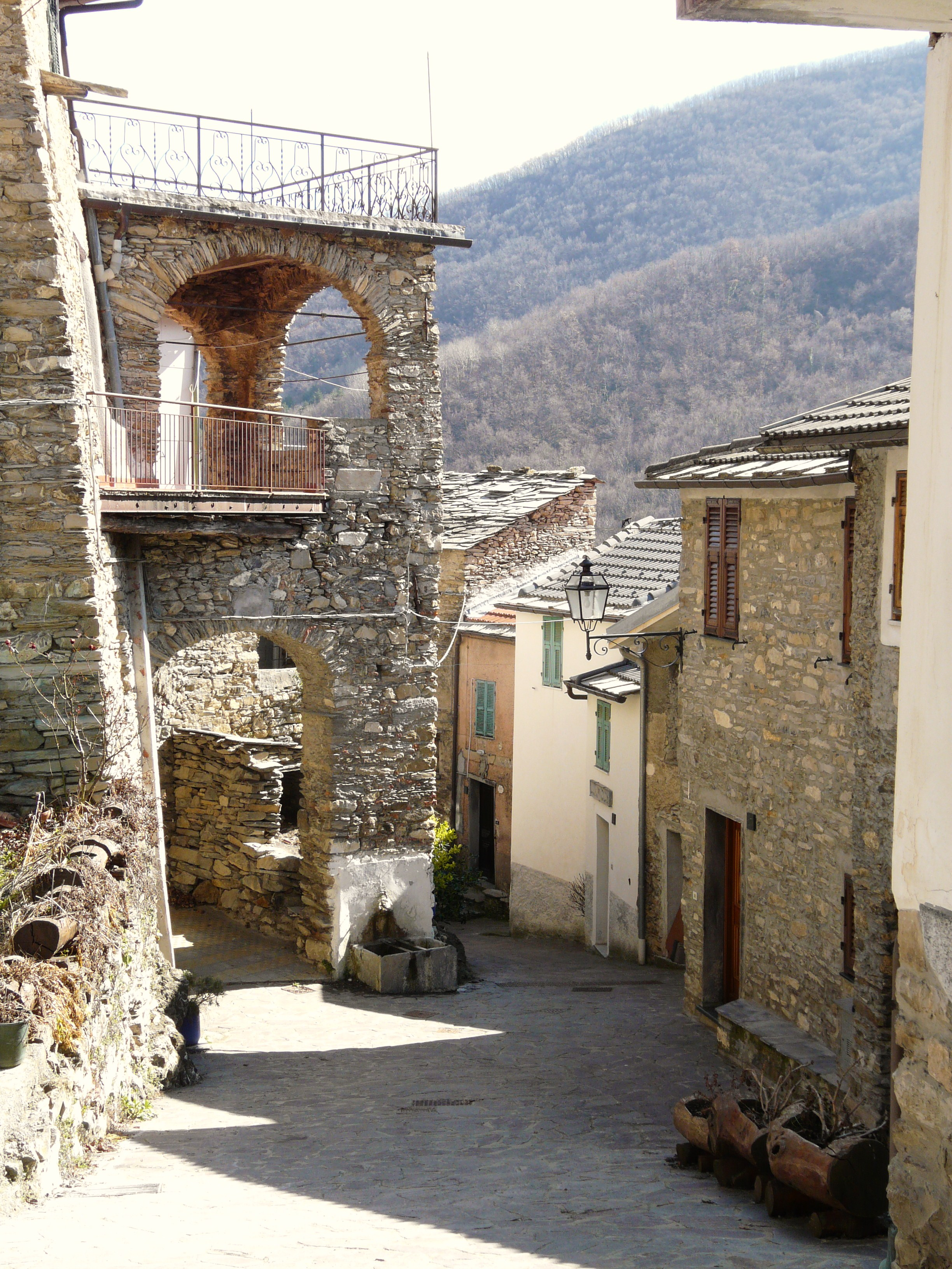 Rezzo, Liguria, Italia